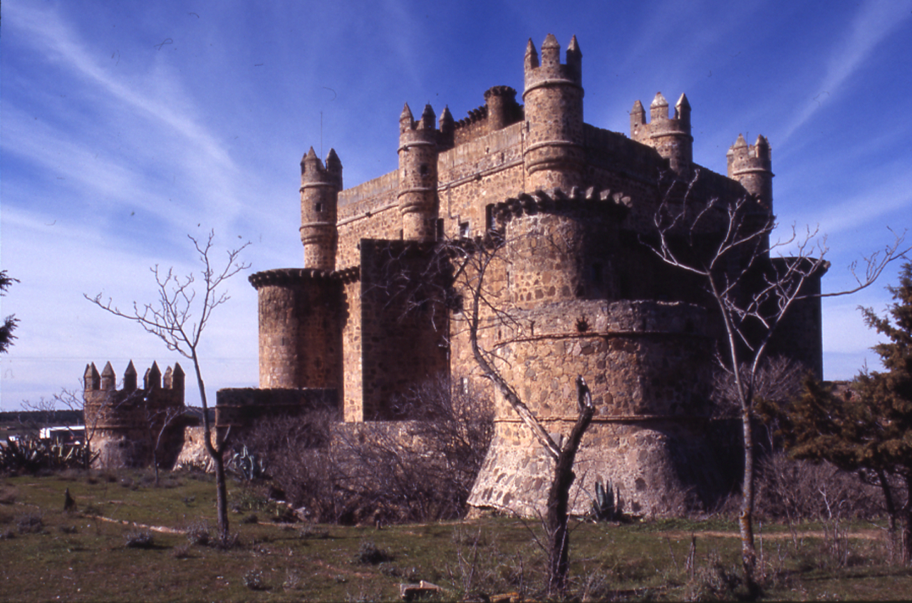 Servizio fotografico : España, 1980 / Paolo Monti. - Foglio: 1, Fotogrammi complessivi: 18/20 : Diapositiva, sviluppo cromogeno/ pellicola ; 35 mm. - ((Fonte: Rubrica di Paolo Monti: Diapositive 24x36mm (1948-1982), presso Archivio Paolo Monti. Rubrica con elenco soggetti e numeri di inventario (da 1 a 1000) corrispondenti ai fogli a tasche in pvc in cui sono contenute le diapositive.